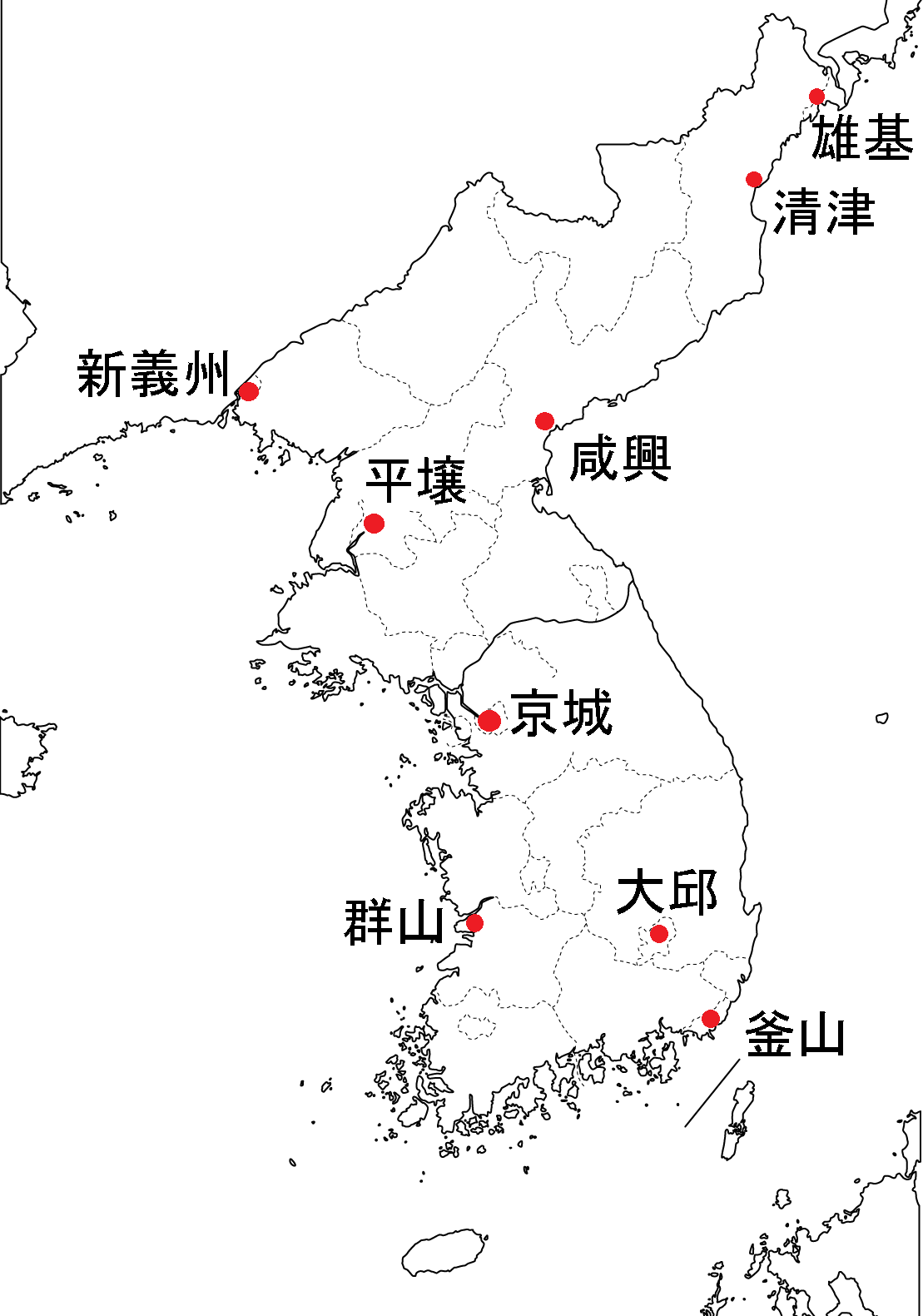 日本統治時代の朝鮮競馬場所在地